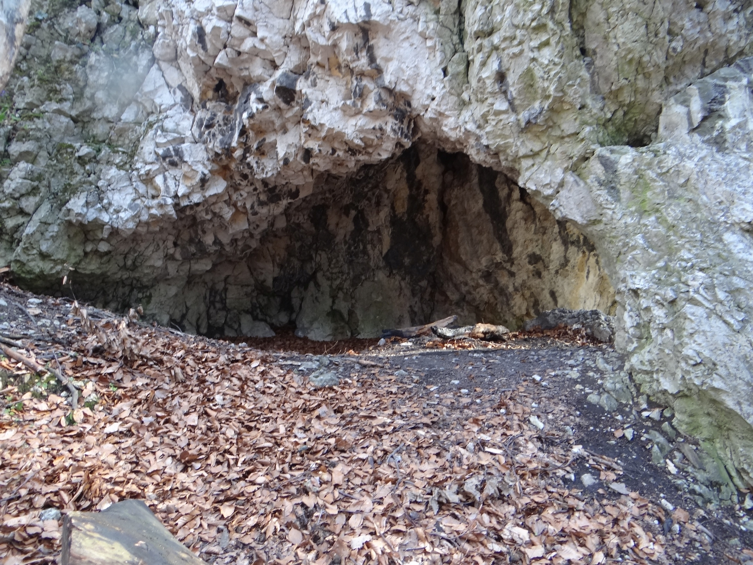 Schronisko Żarskie I w Dolinie Racławki